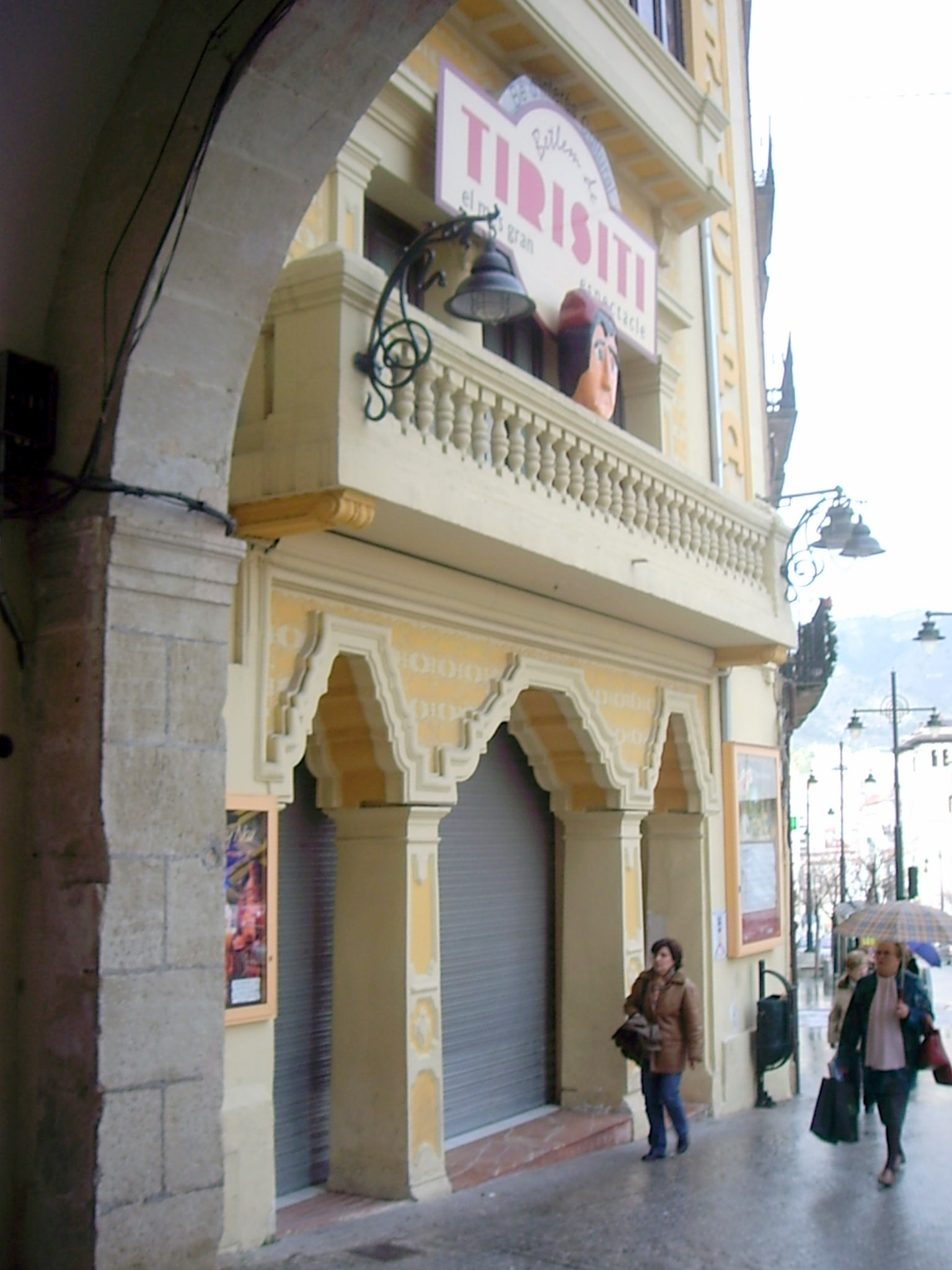 Teatre principal d'Alcoi. Seu del Betlem del Tirisiti